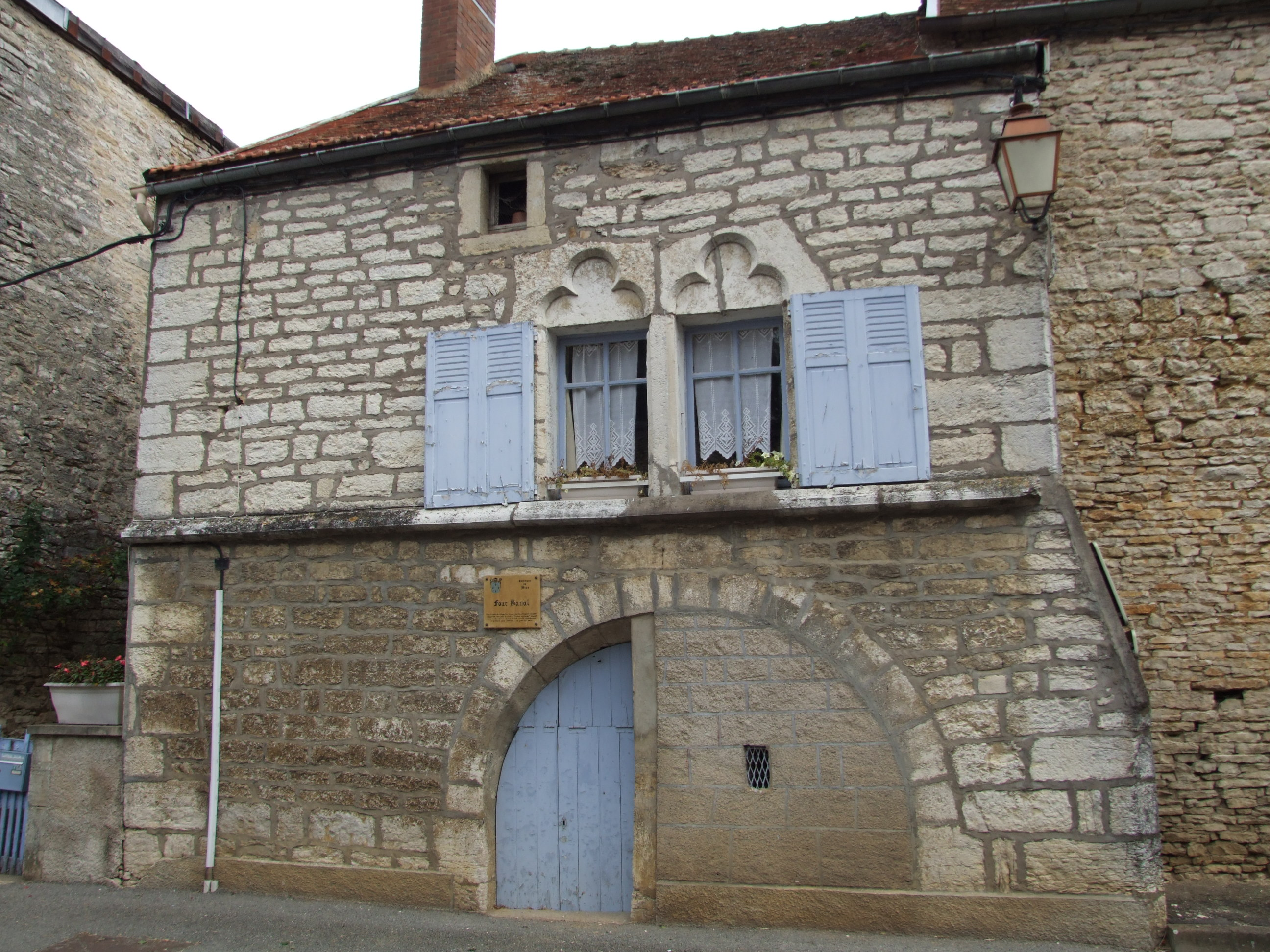 Fourn banal, Bèze, Côte d'Or, Bourgogne, FRANCE